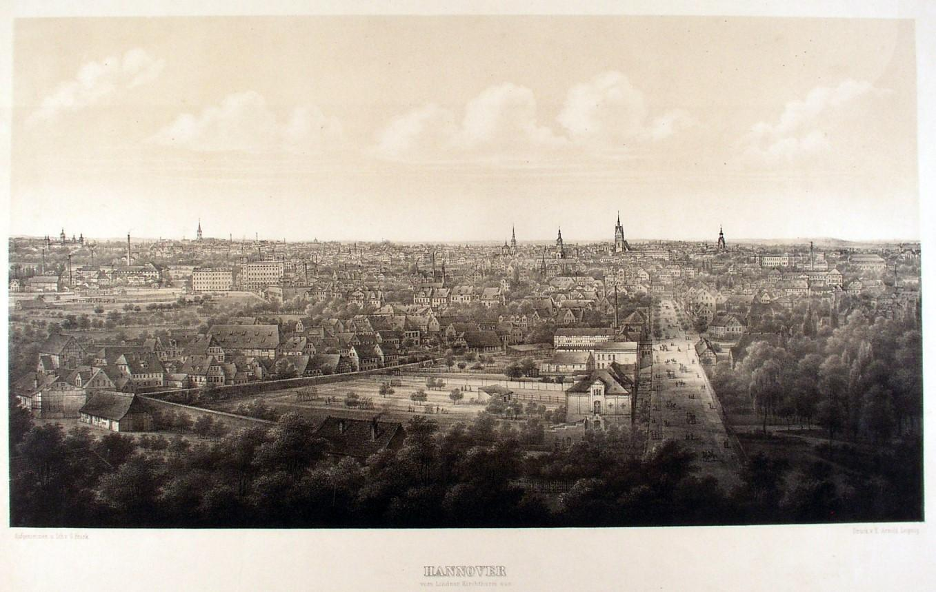 Gering aufgelöstes Digitalisat einer Vogelschau-ähnlichen Gesamtansicht von Linden aus in Richtung des Zentrums von Hannover, untertitelt „Hannover vom Lindner Kirchthurm aus“ Die Lithographie schuf der Künstler, Landschaftsmaler, Zeichner und Lithograph Gustav Frank (1819 Stralsund - 1886 Dessau), der durch die von ihm geschaffenen mehr als 90 großformatigen, lithographierten Ansichten deutscher Städte, die er mit großem Detailreichtum abbildete, berühmt wurde. Das hier zu sehende Werk wurde im Original um 1860 in der Lithographischen Anstalt von H. Arnold in Leipzig gedruckt in den Maßen 34 x 61 cm. Im Jahr 2017 wurde das Blatt bei Peter Bierl Buch- & Kunstantiquariat (Eurasburg, Deutschland) in gutem Zustand für 2.000,-- Euro angeboten. Für die Zukunft wünschen wir uns ein wesentlich höher aufgelöstes, mindestens ein hochaufgelöstes Digitalisat ...